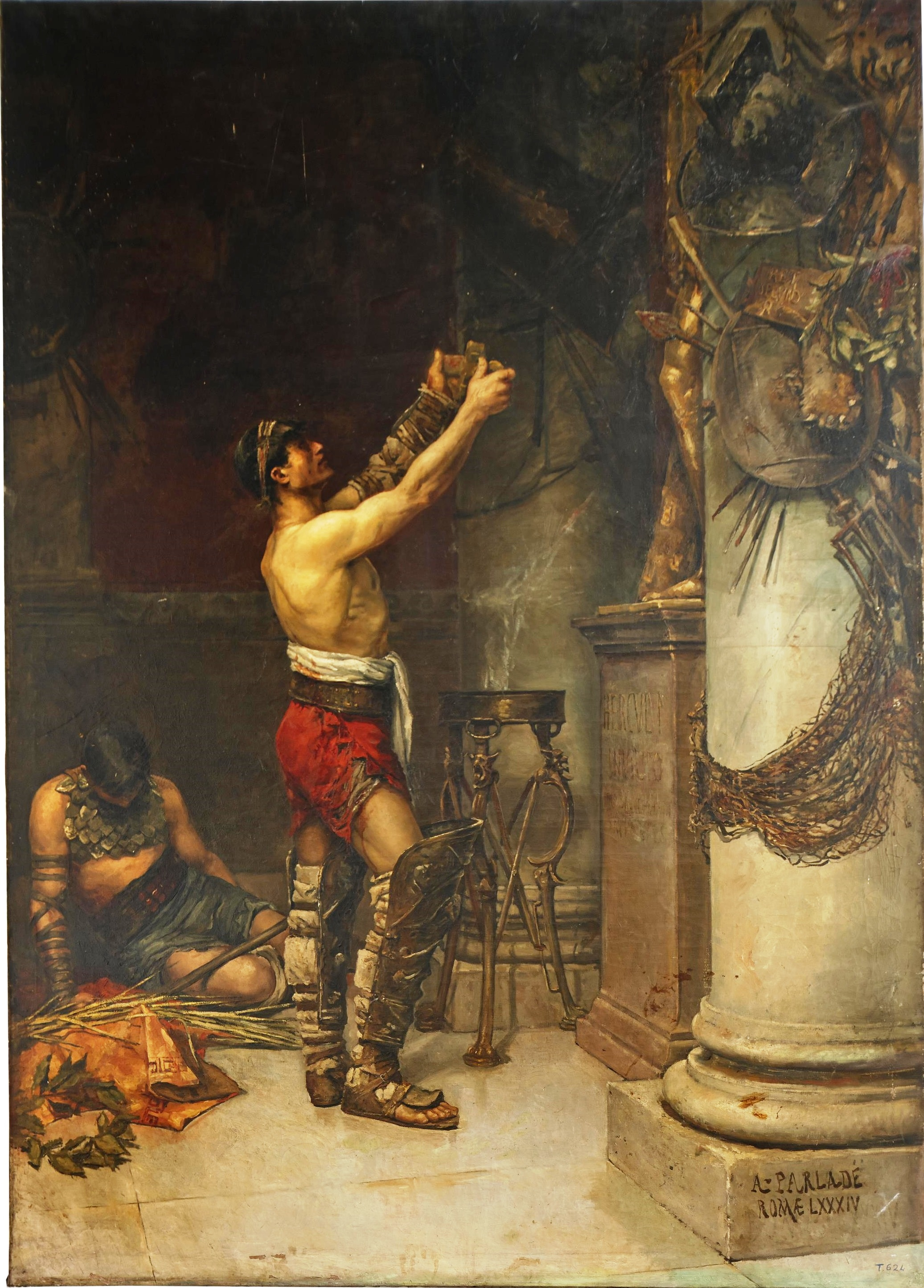 La obra representa a unos gladiadores de la antigua Roma ofreciendo sus armas a Hércules guardián.